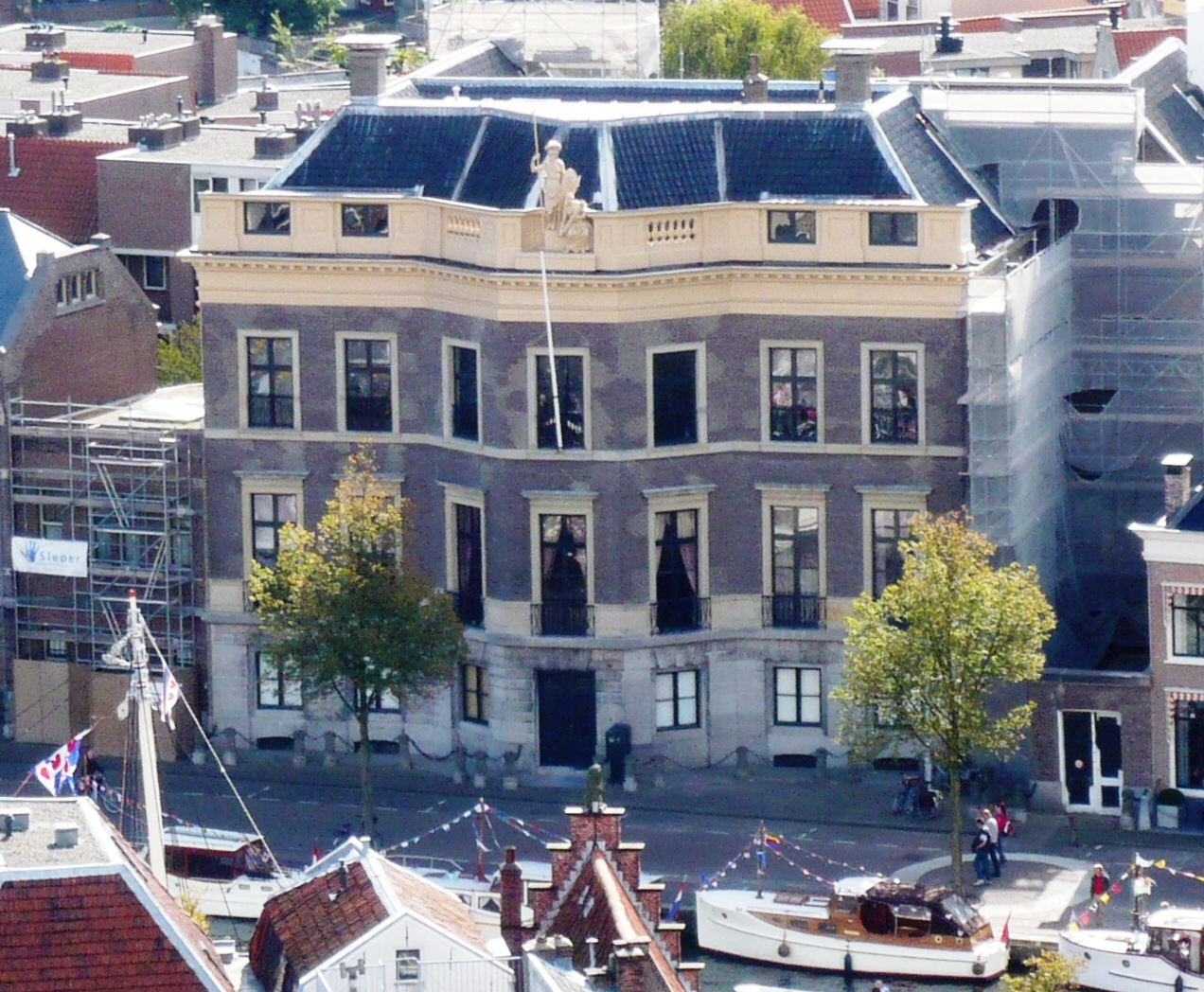 Hodshon Huis, Spaarne 15-17. Location of the Maatschappij van Wetenschappen, or Society of Science, on the Spaarne river in Haarlem, the Netherlands. Built by Abraham van der Hart in 1794 for Cornelia Catharina Hodshon.